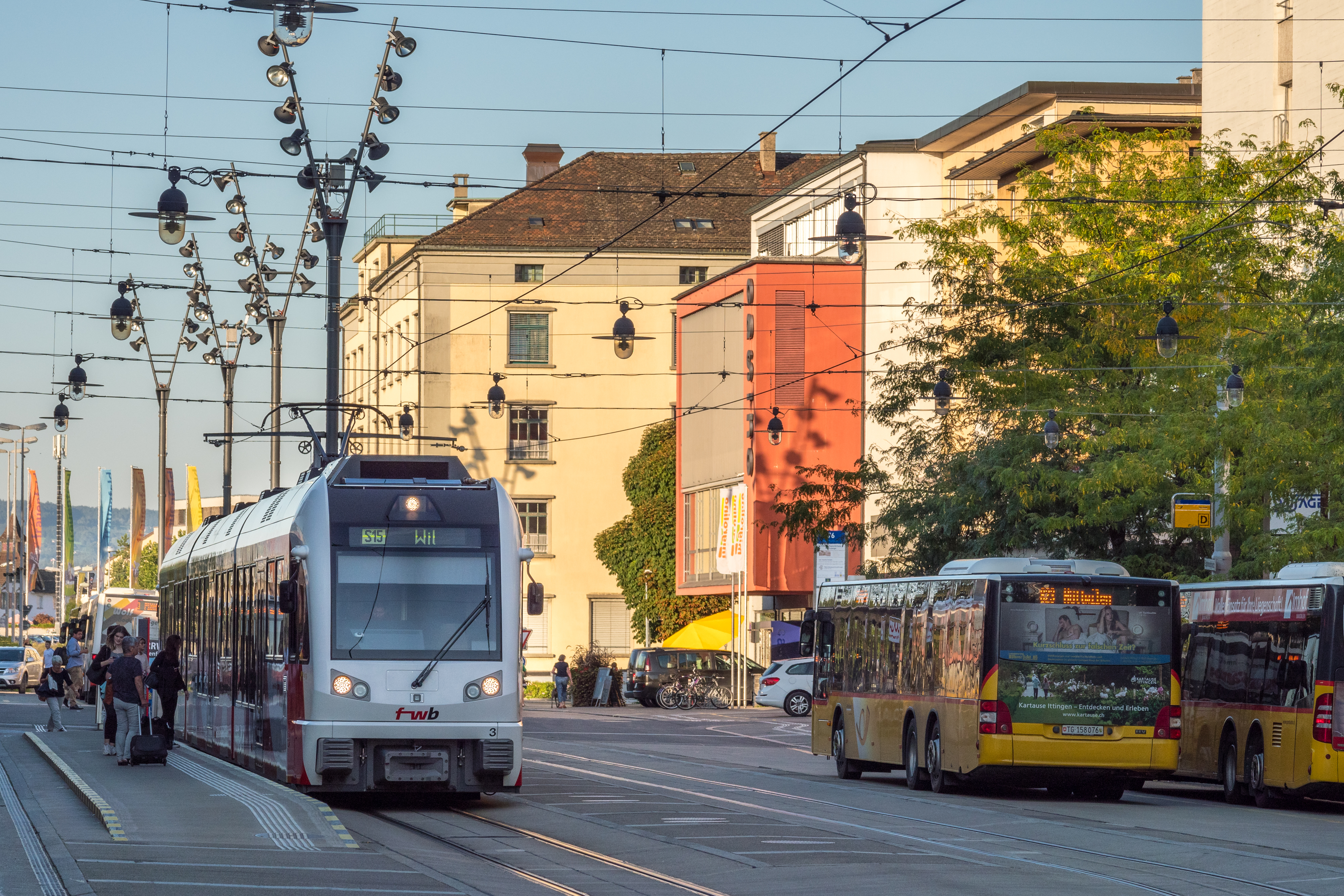 Frauenfeld: Bahnhofplatz mit Frauenfeld-Wil-Bahn und Postautos